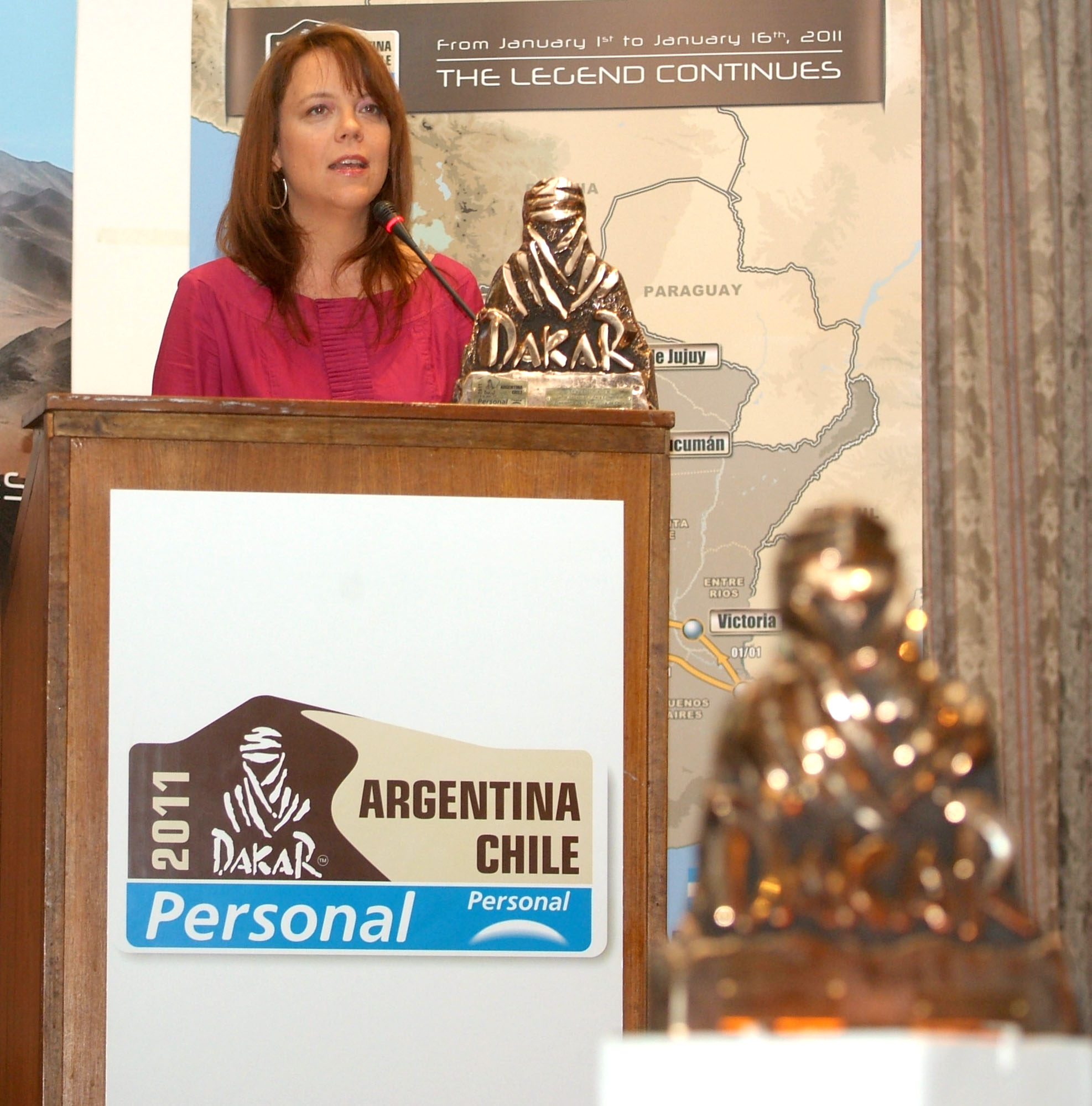 Ministra Secretaria General de Gobierno, Ena von Baer junto al Subsecretario de Deportes, Gabriel Ruiz Tagle, encabezan lanzamiento del Dakar 2011.